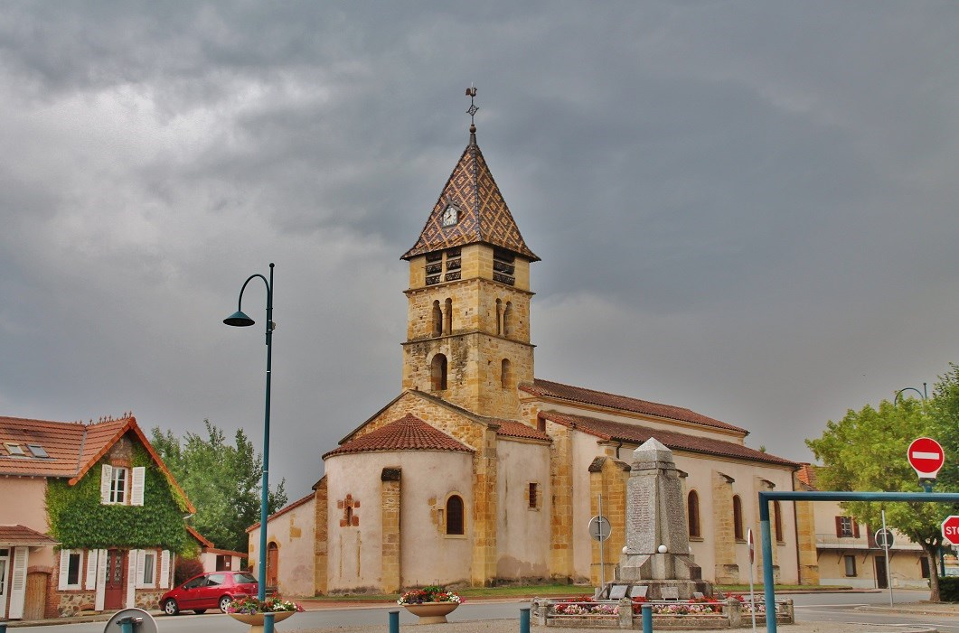 église Ste Irenée